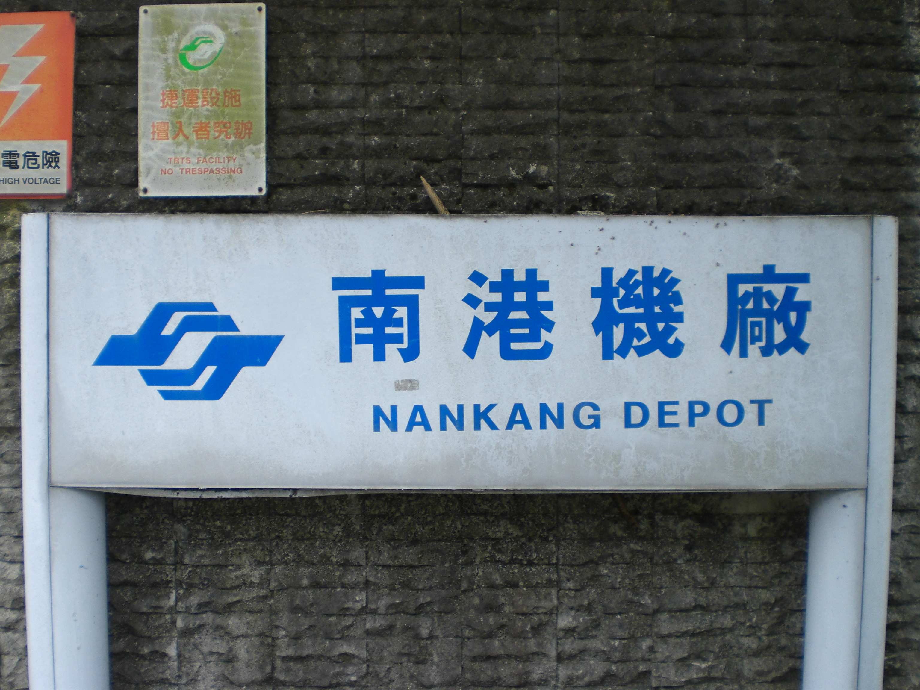 臺北捷運南港機廠大門標示牌。